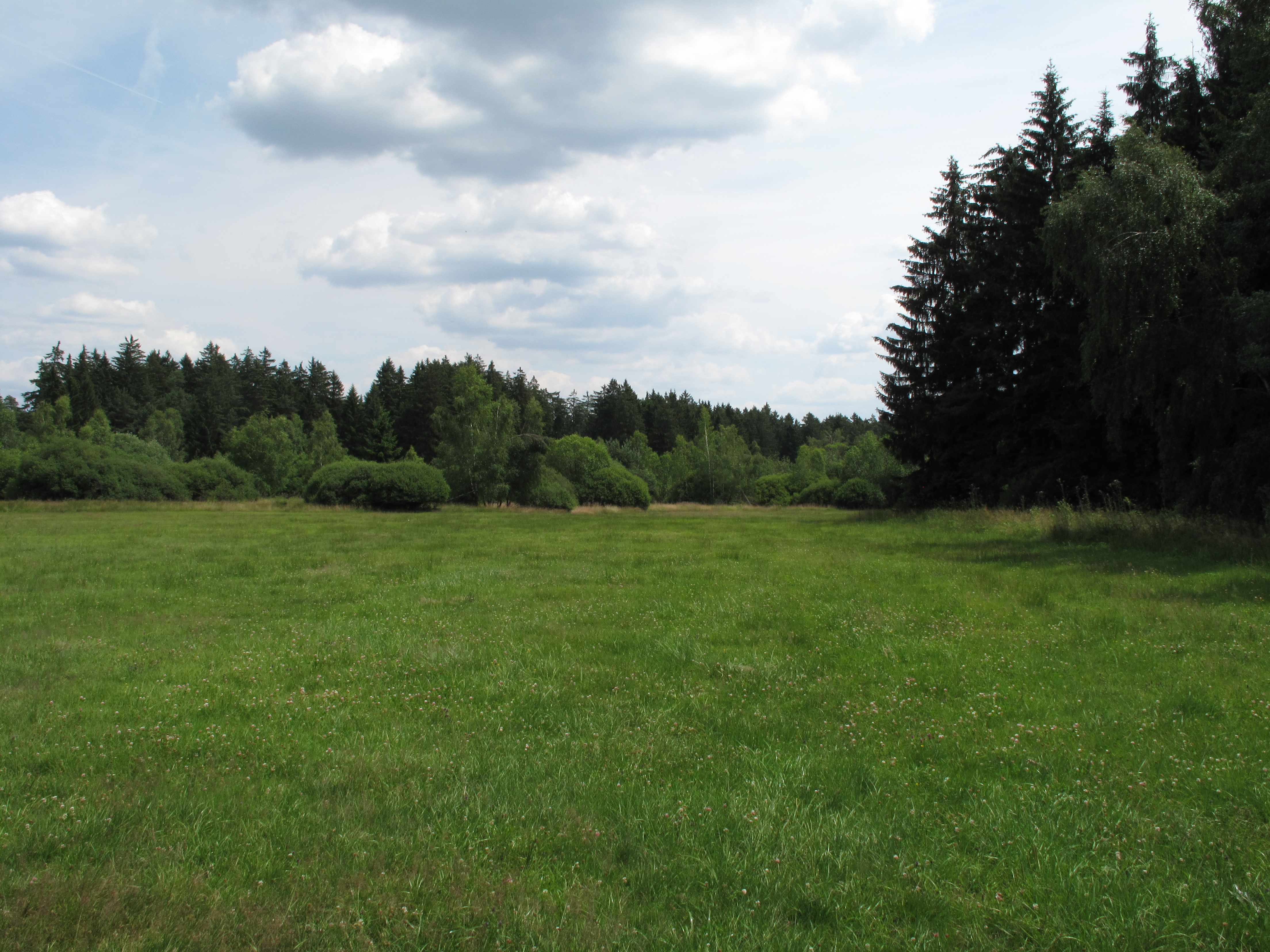 Přírodní rezervace U Miličovska. Okres Pelhřimov, Česká republika.